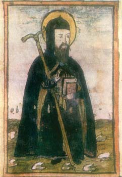 Вардан Айгекци в миниатюре XVII века